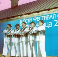 Козарчани пјевају ојкачу